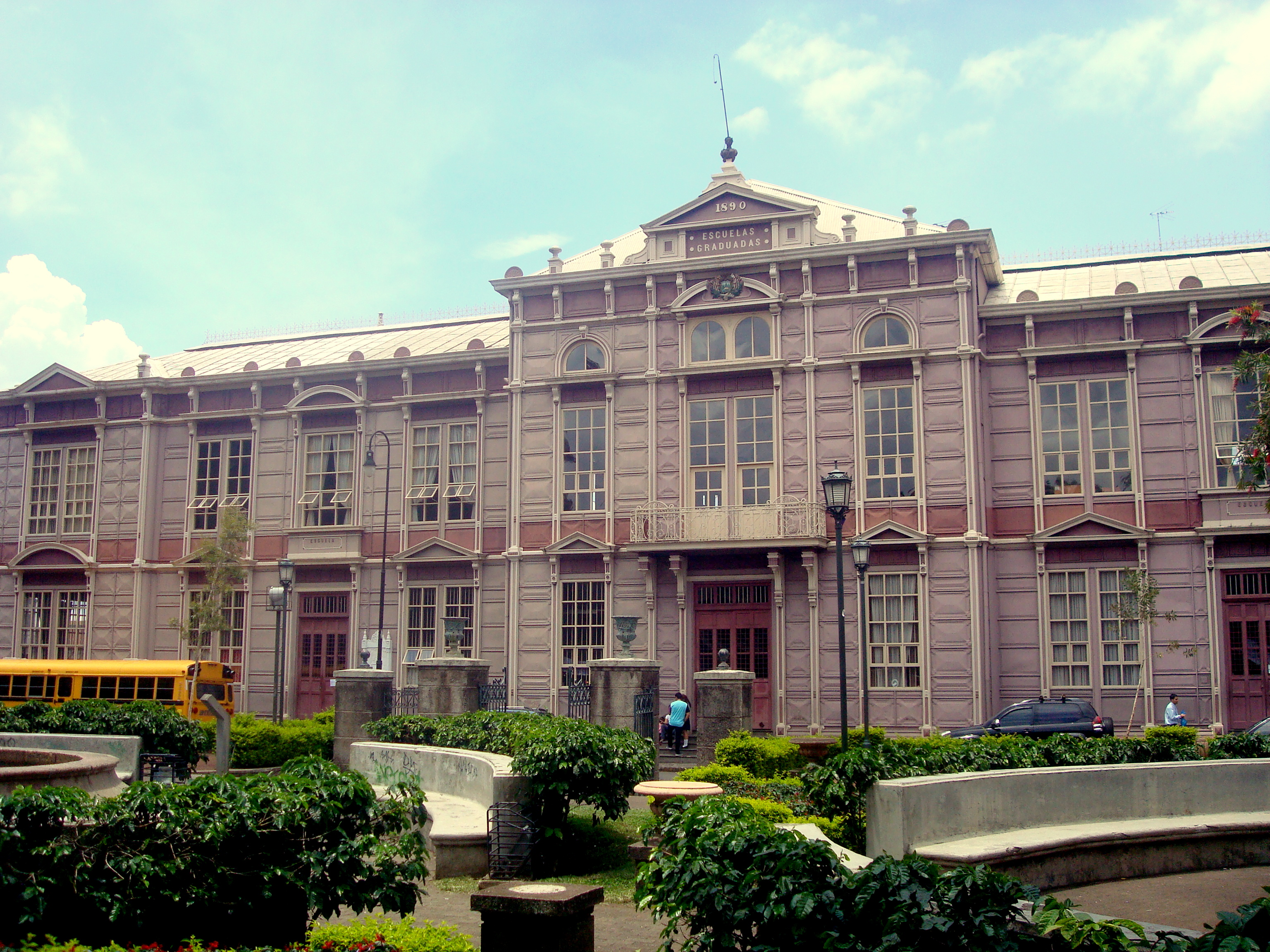 La Escuela Buenaventura Corrales, conocida como «Edificio metálico». Construida en 1889 en hierro sólido e inspirada en el diseño del arquitecto belga Joseph Danly, es patrimonio de la educación costarricense.